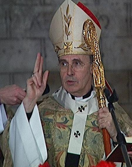 Fête de st Thomas - Toulouse (france) - église des jacobins